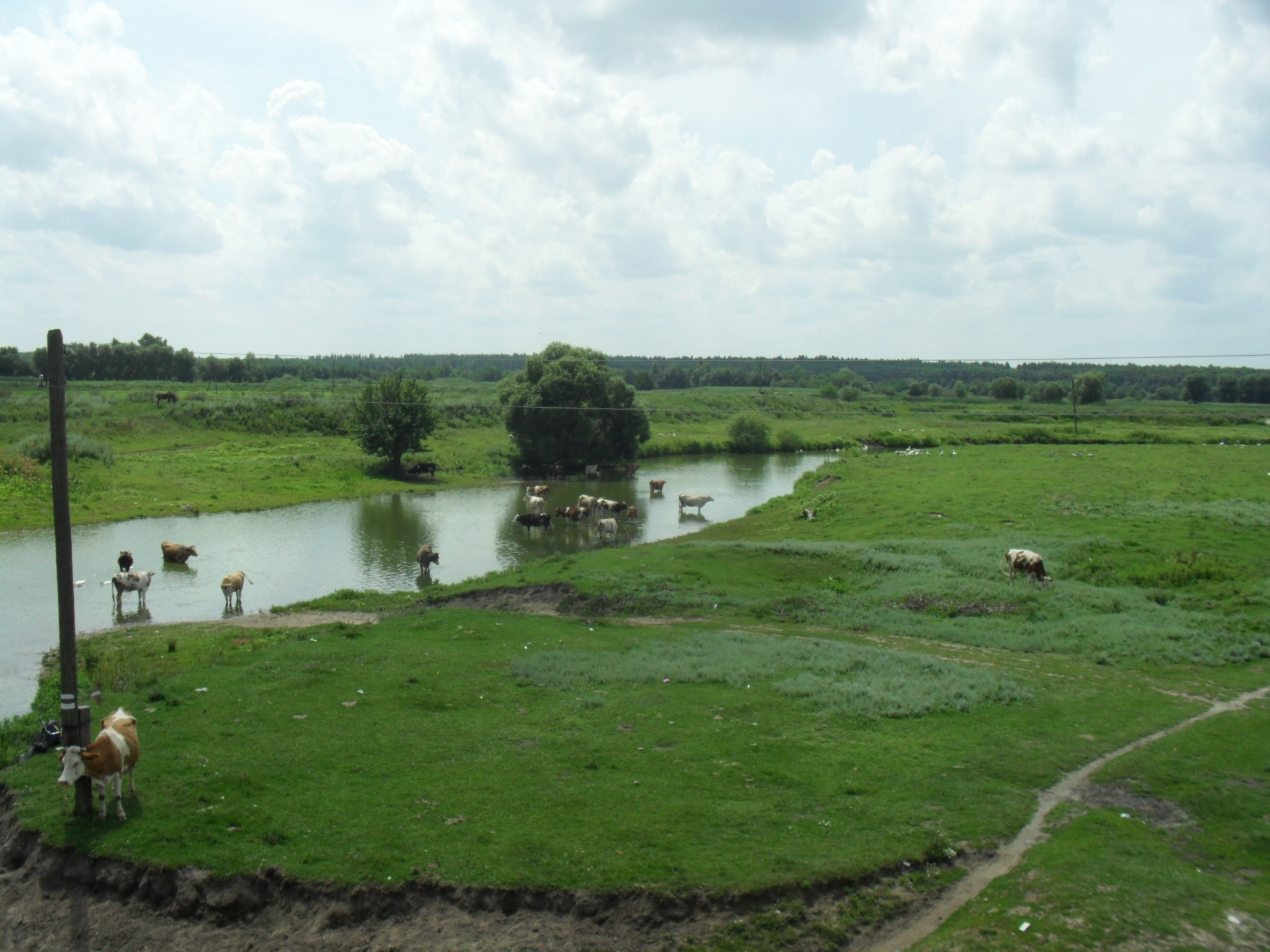 смт Турбів. Вид на річку з залізничного моста